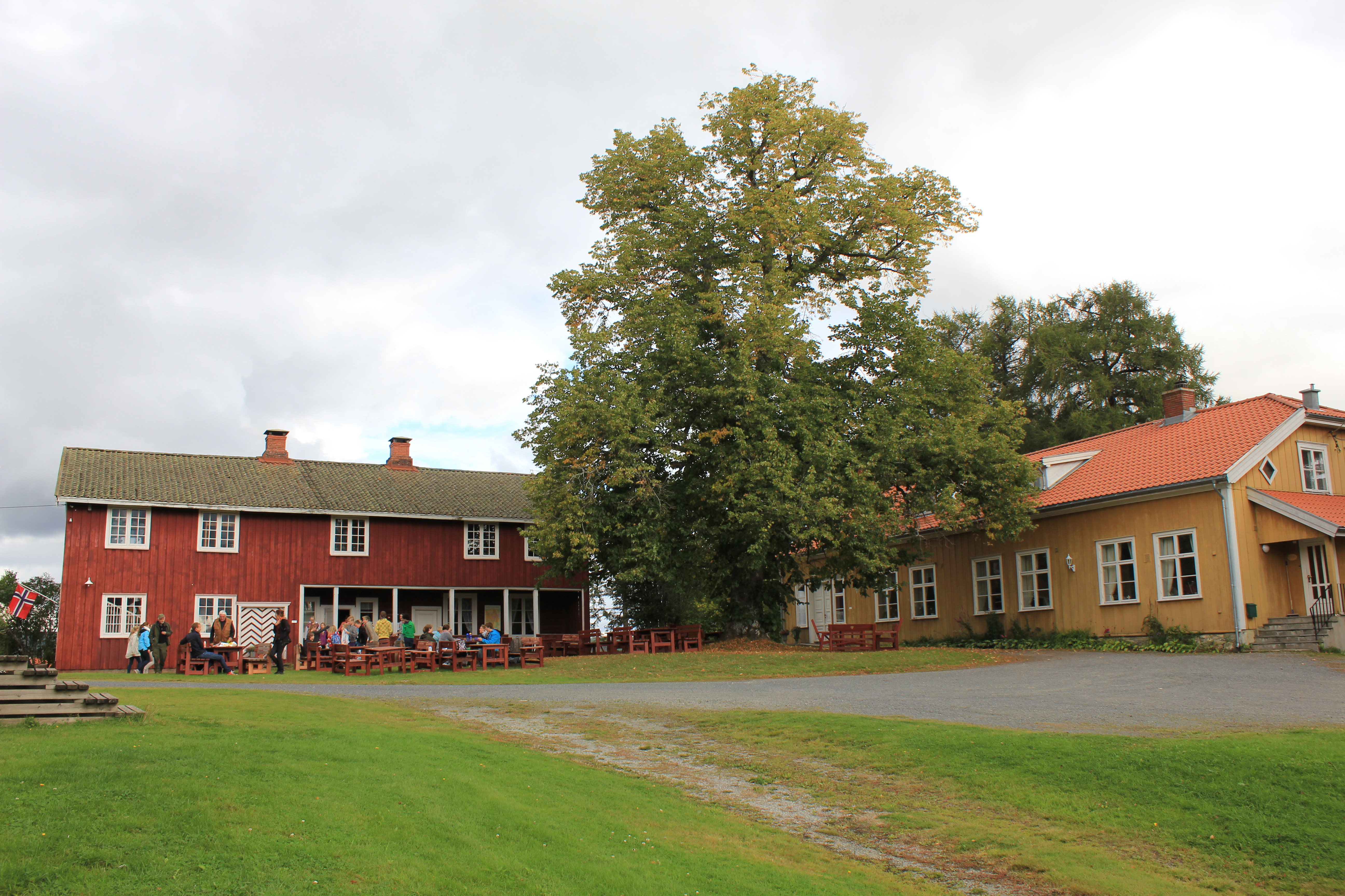 Aur prestegård ligger i Aurskog-Høland kommune i Akershus. Aur prestegård og Aurskog kirke ligger på et høydedrag sentralt i tettstedet Aurskog i den nordlige delen av kommunen. Her har kirke og prestegård ligget helt siden middelalderen. De nåværende bygningene på gården er fra 1700-tallet og fremover. Tre av husene er formelt fredet i henhold til §15 i "Lov om kulturminner".Эрзянь: Aur Prestegård in Akershus, Norway.